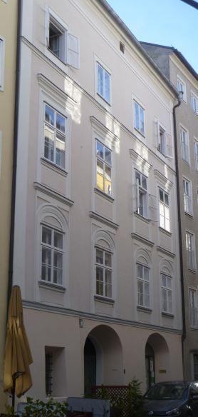 Schwarzenbergsches Kanonikatshaus, ehem. Höglwörtherhof, Domherrenhof